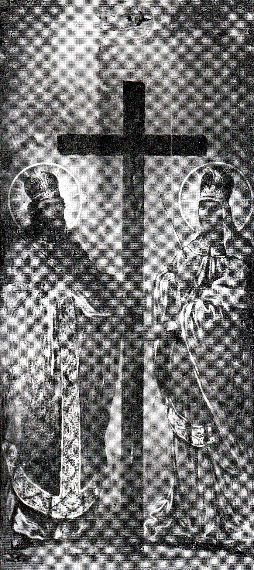 Icoana pictata de Gheorghe Grigorescu cu Sfinții Împărați Constantin și Elena. Icoana se află și astăzi la biserica ortodoxă de la Pitaru, Dâmbovița.